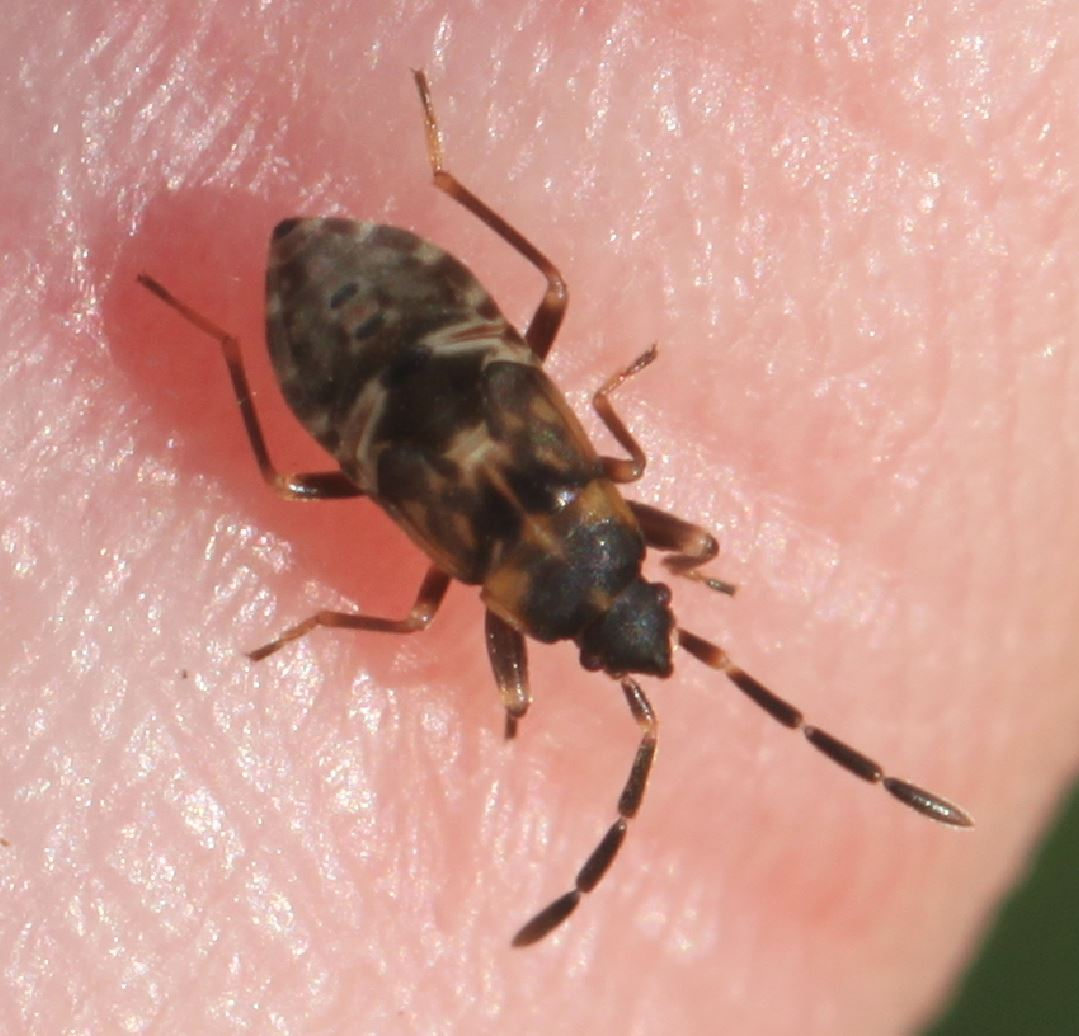 Nymphe von Scolopostethus cf. decoratus in Heckenbiotop an Fingerkraut am 5. November 2019 in Walldorf/Baden